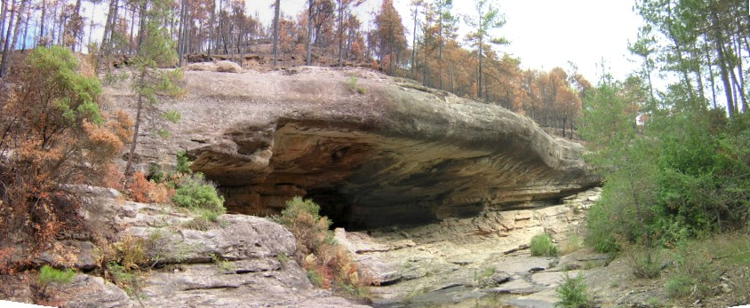 La Balma Freda (Monistrol de Calders, Moianès)